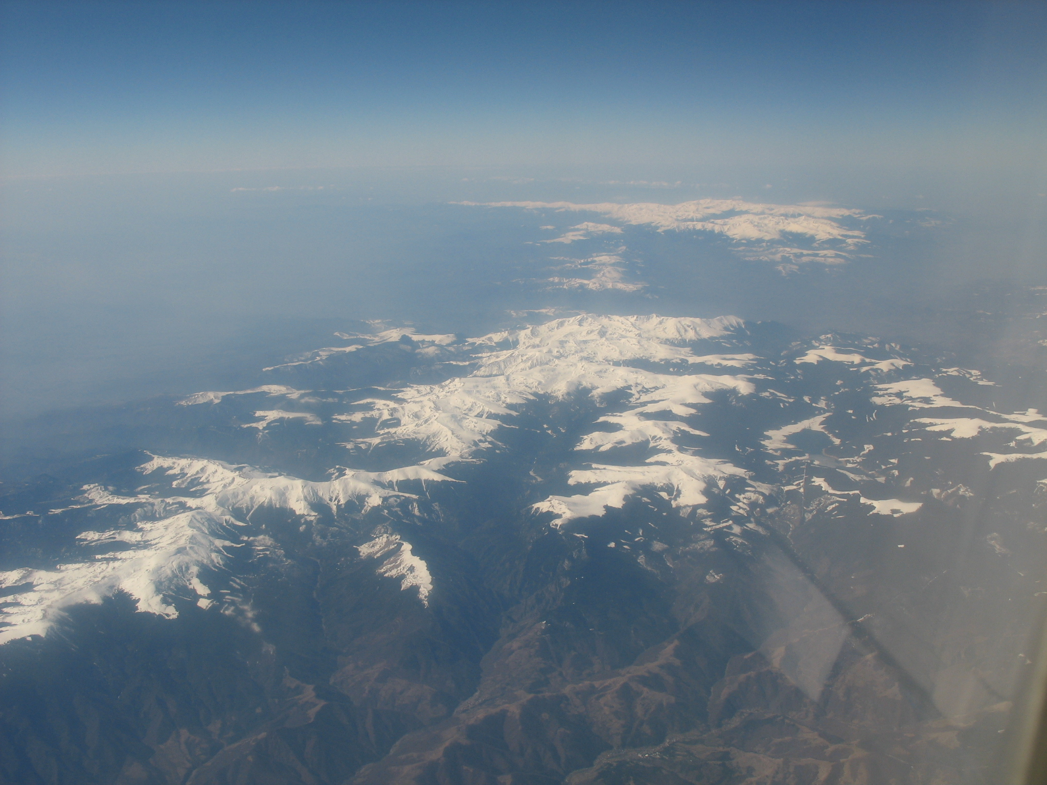 Carpaţii văzuţi din avion Bucureşti-Viena, martie 2007